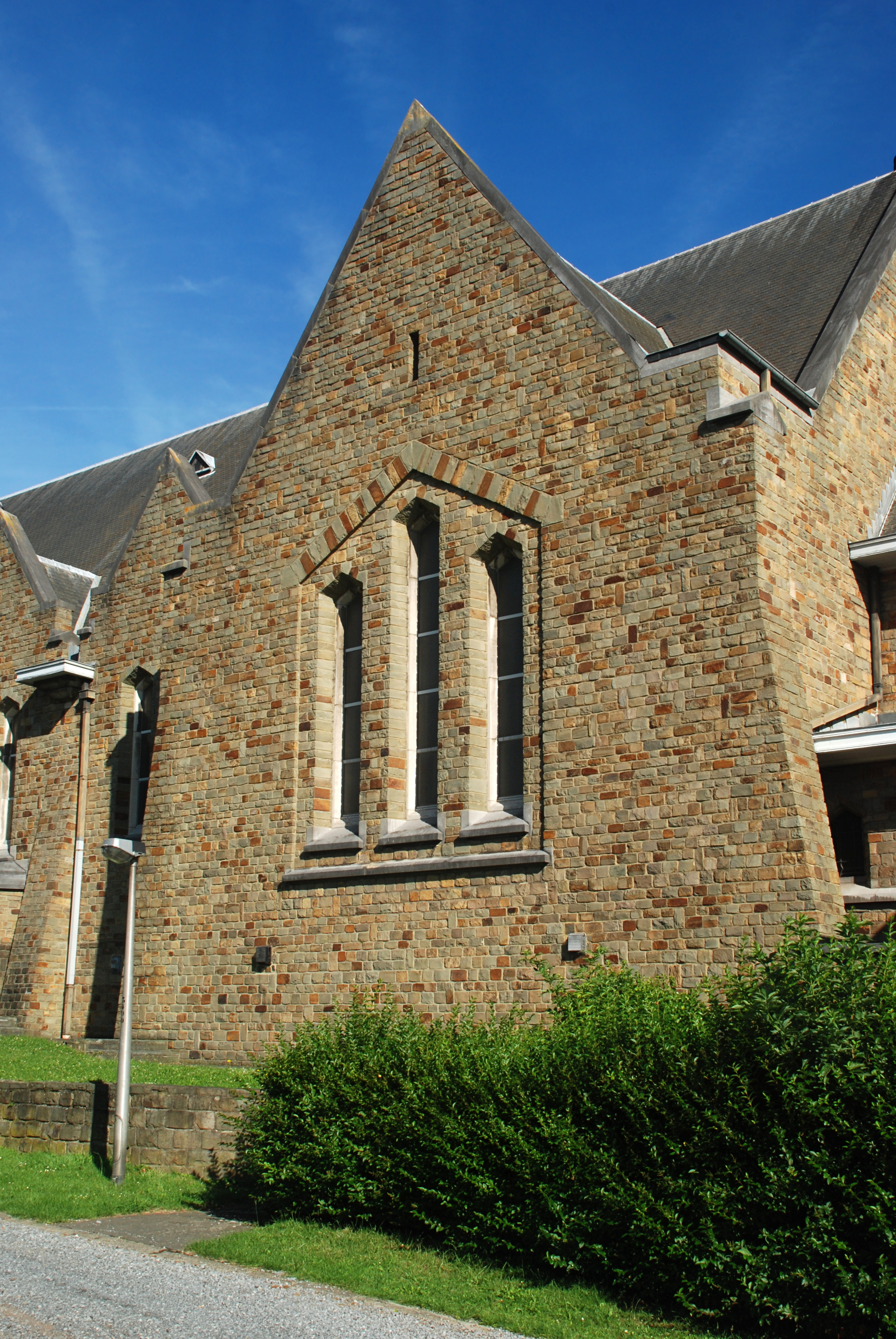 Belgique - Babant wallon - Ottignies - Eglise Saint-Géry de Limelette (néo-roman 1955)